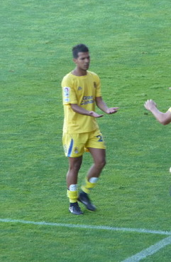 Jonathan Viera, jugador de la UD Las Palmas, siendo sustituído.